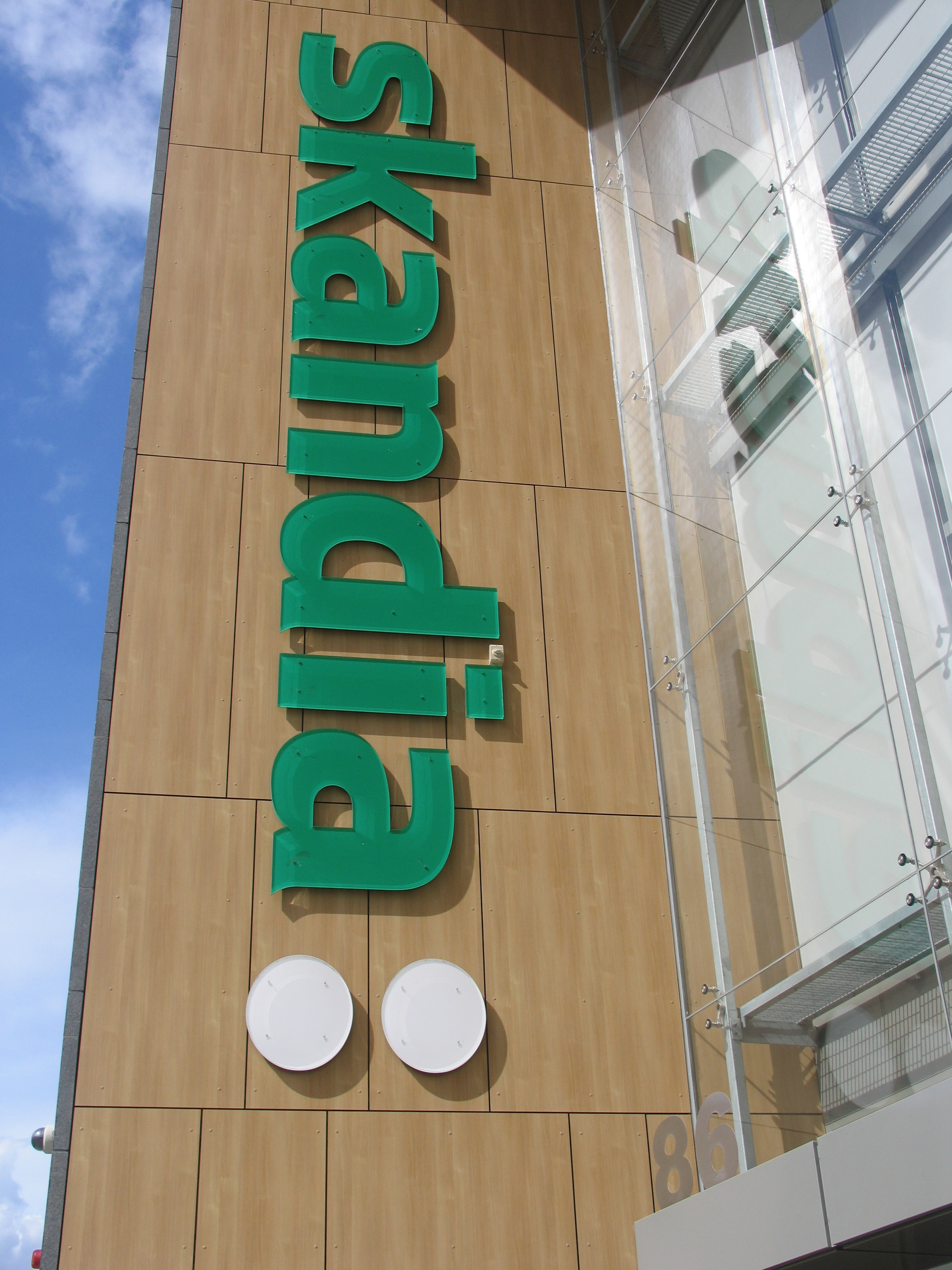 Skandias entré till huvudkontoret i Stockholm.